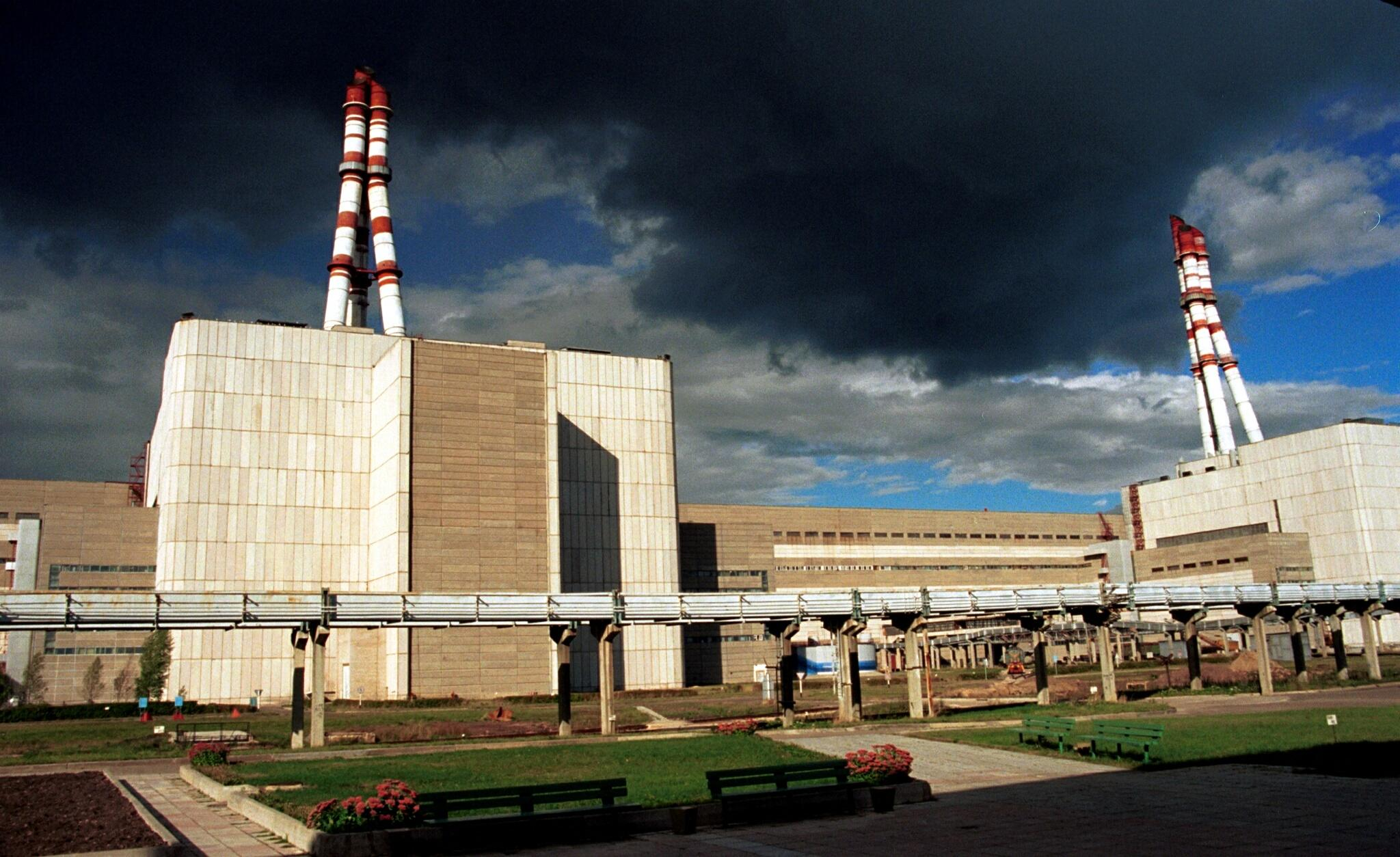 Atomkraftverket i Ignalina, Litauen